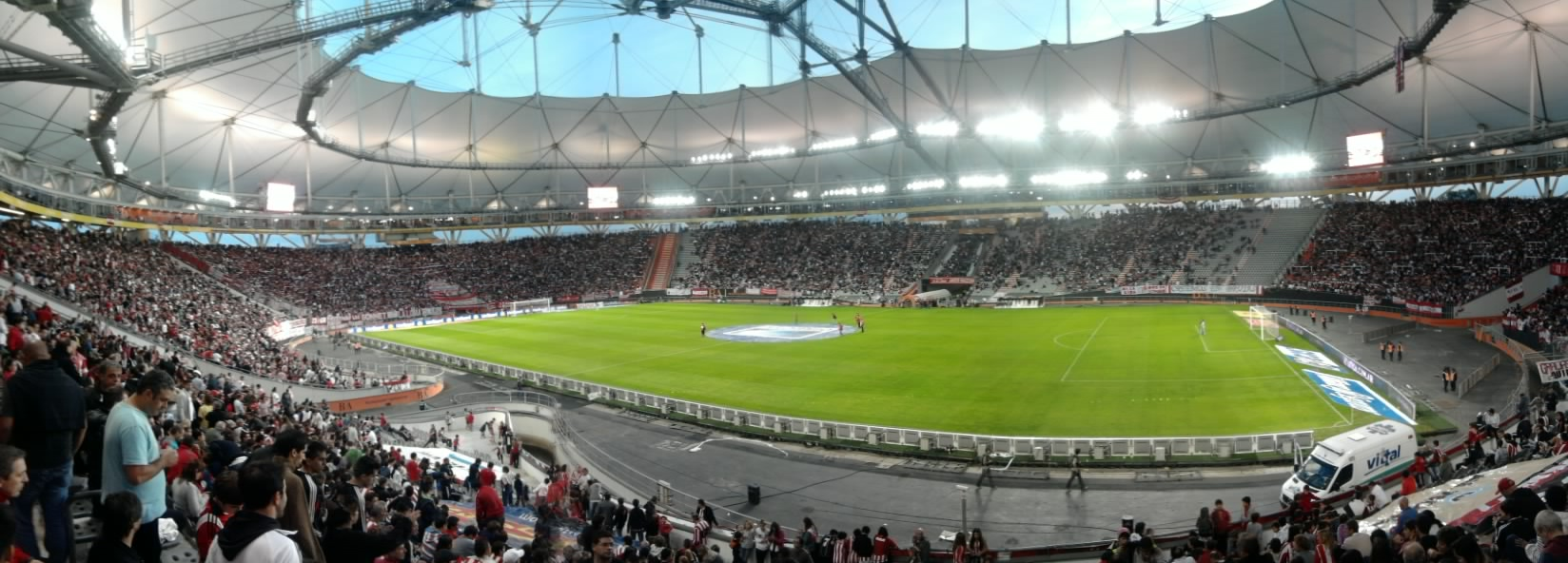 Estadio Ciudad de La Plata. Partido entre Estudiantes y San Lorenzo por la penúltima fecha del Torneo Inicial 2014. Despedida de Juan Sebastián Verón.